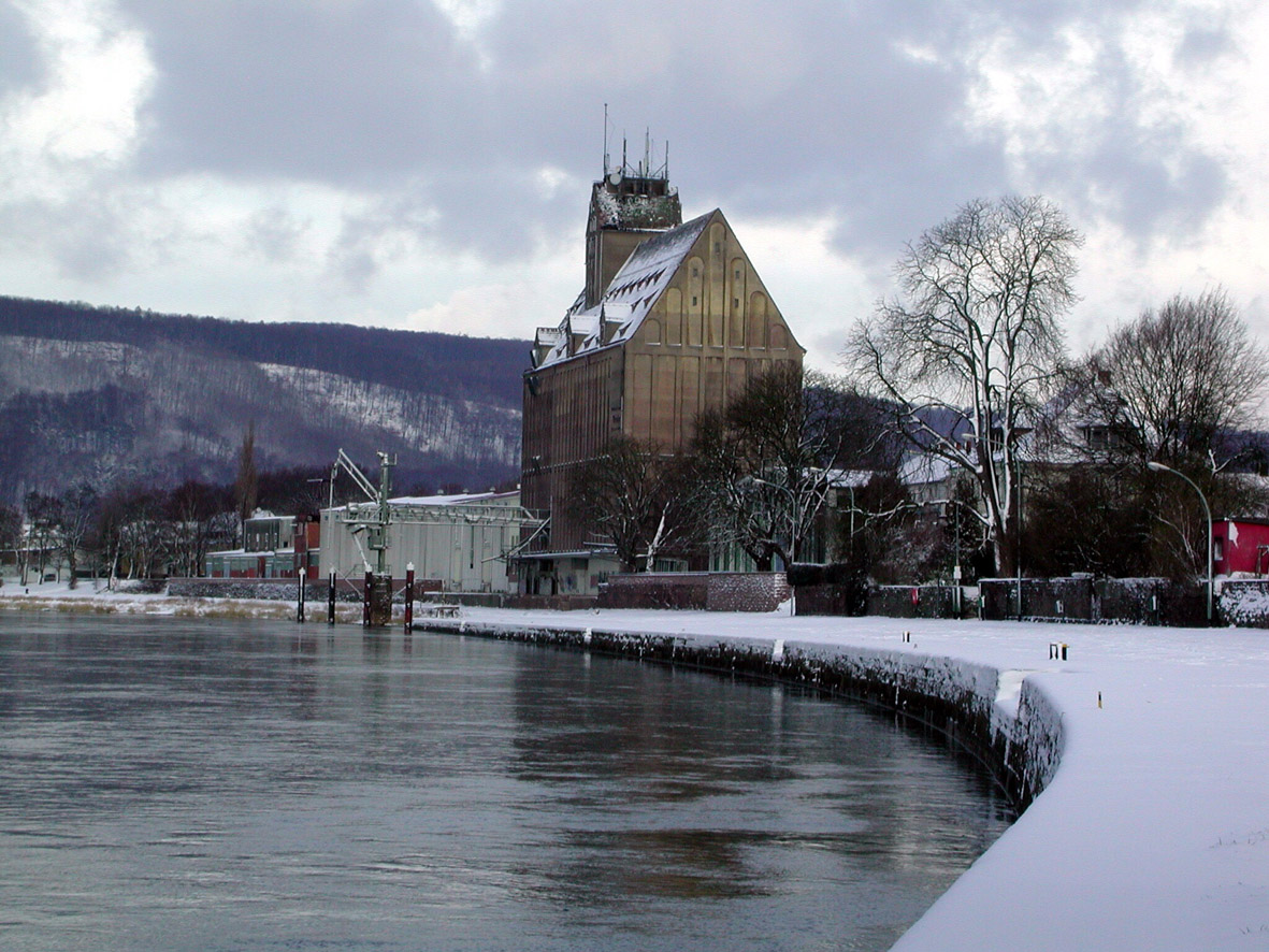 Holzminden, Weserkai und Speicher